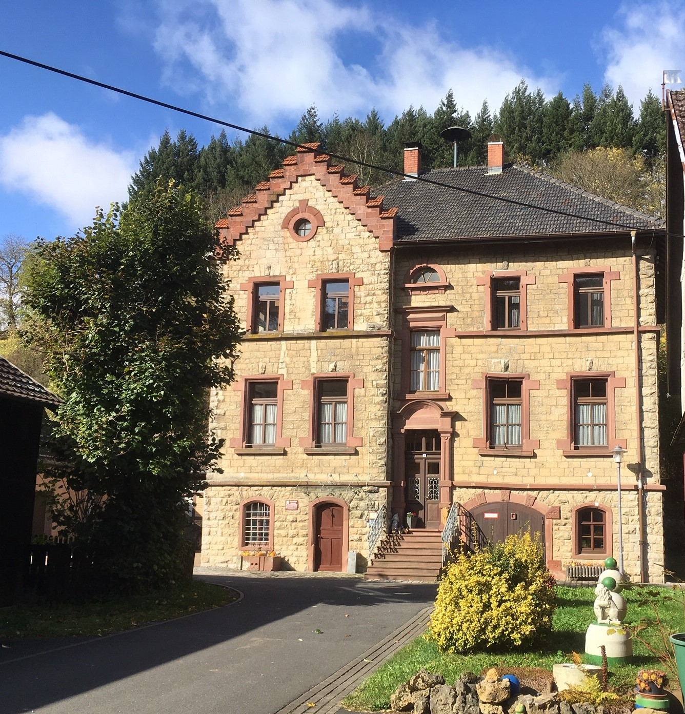 Angeltürn bei Boxberg (Baden) ehem. Rathaus und Schule